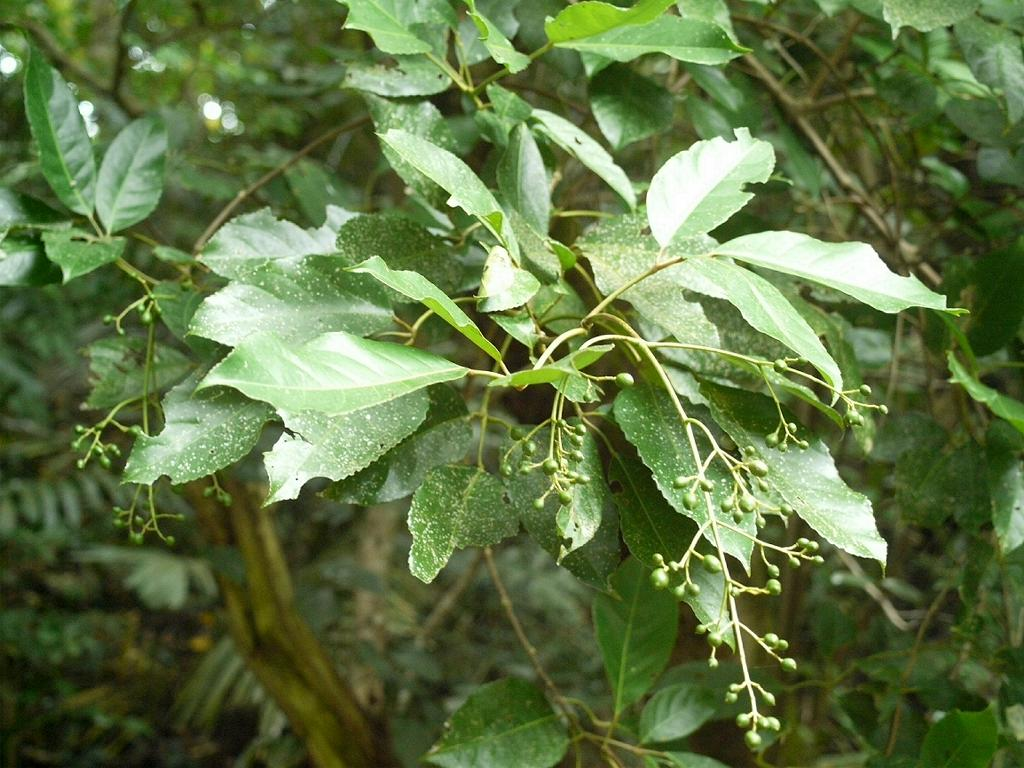 Turpinia ternata：ショウベンノキ 2008/08/11 沖縄本島南部：Okinawa Island, Japan